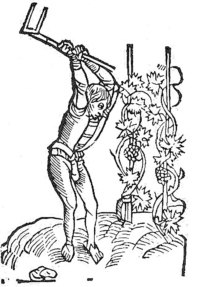 Binage Gravures sur bois du recueil "Petra de Crescentia commodorum ruralium Opus libri XII". Speyer, 1493.